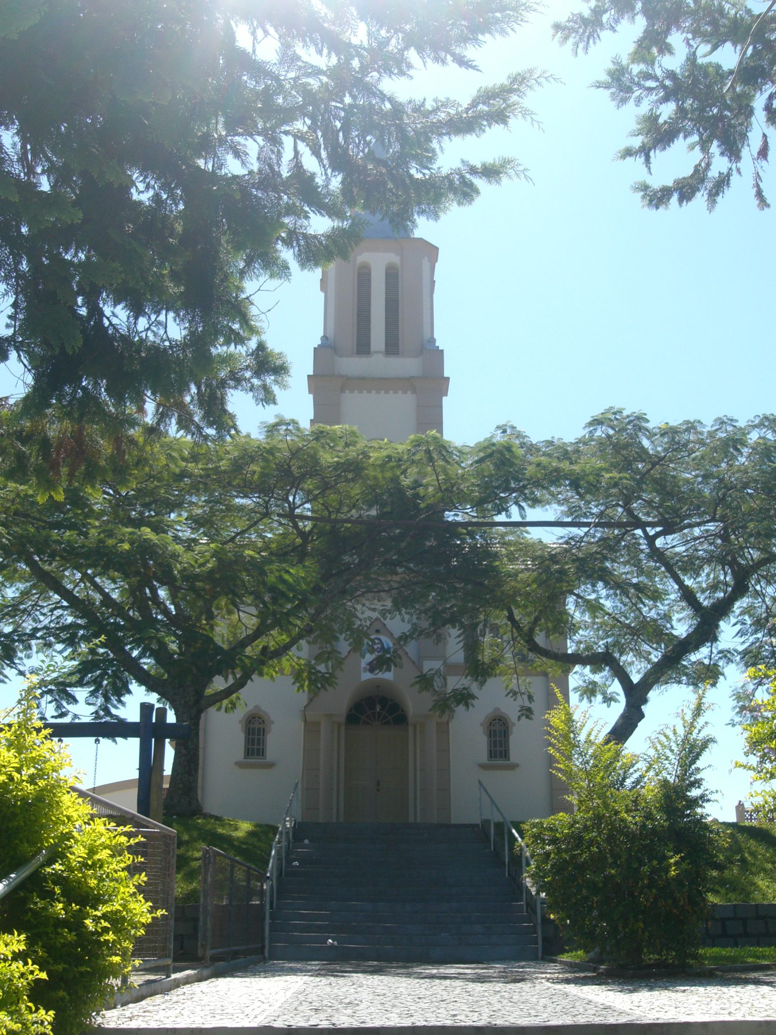 Igreja (church/Kirche/église/chiesa) de Águas Mornas